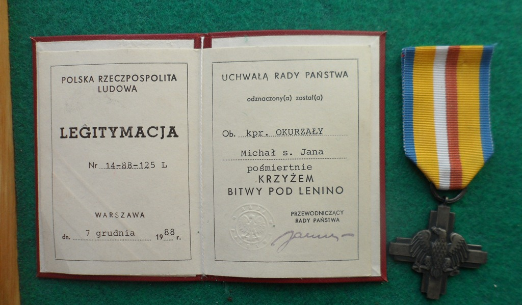 Odbitka zdjęcia w sali tradycji JW 5699. Krzyż bitwy pod Lenino